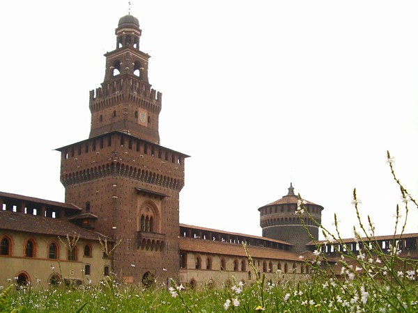 Castello Sforzesco di Milano con la Torre del Filarete vista dal cortile interno. Picture taken by user:Idéfix, august 2004